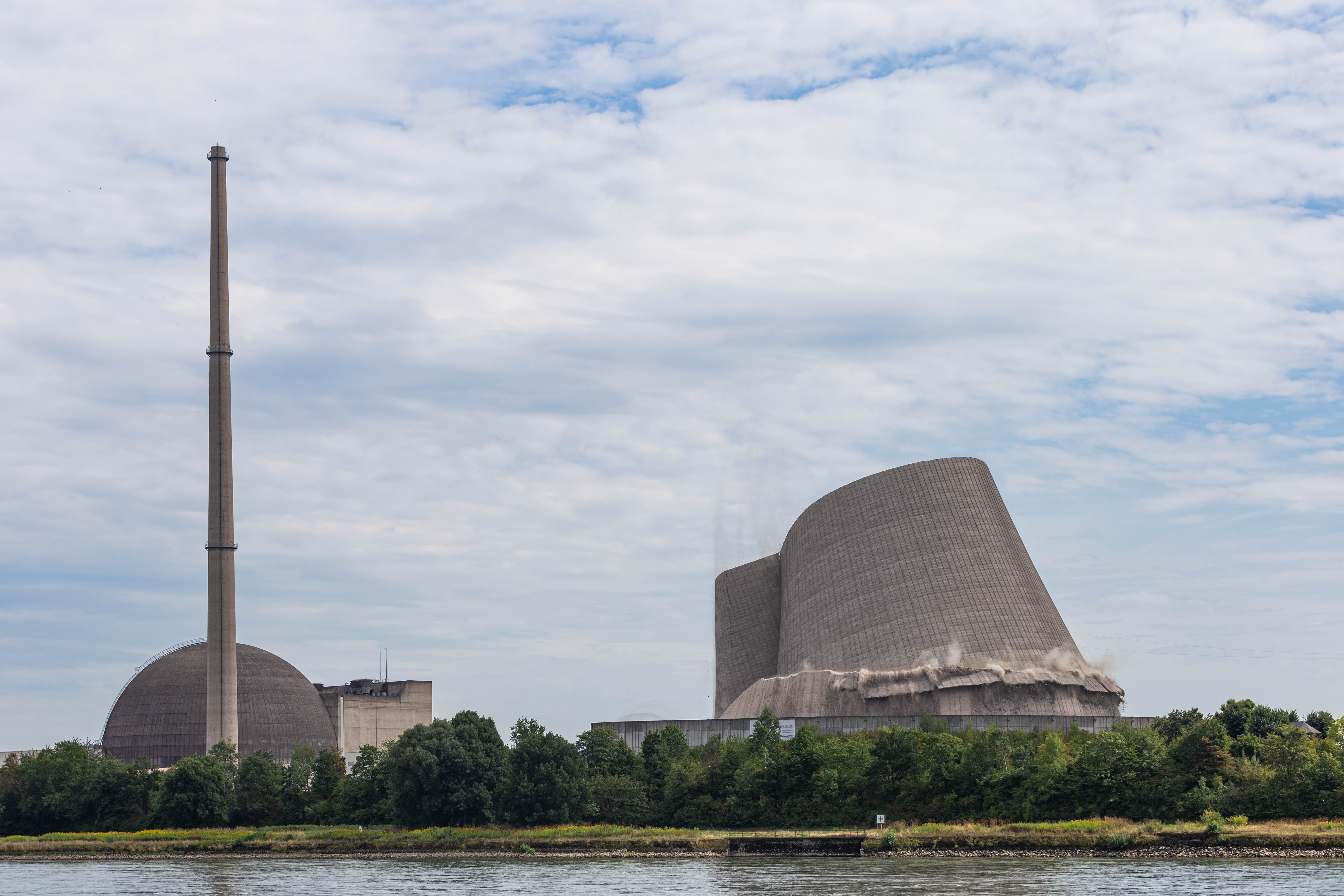 Am 09.08.2019 um kurz nach 15:30 Uhr fällt der Kühlturm des stillgelegten Atomkraftwerks in Mülheim-Kärlich durch das Entfernen von Stützen mit Hilfe zweier ferngesteuerter Bagger in sich zusammen.